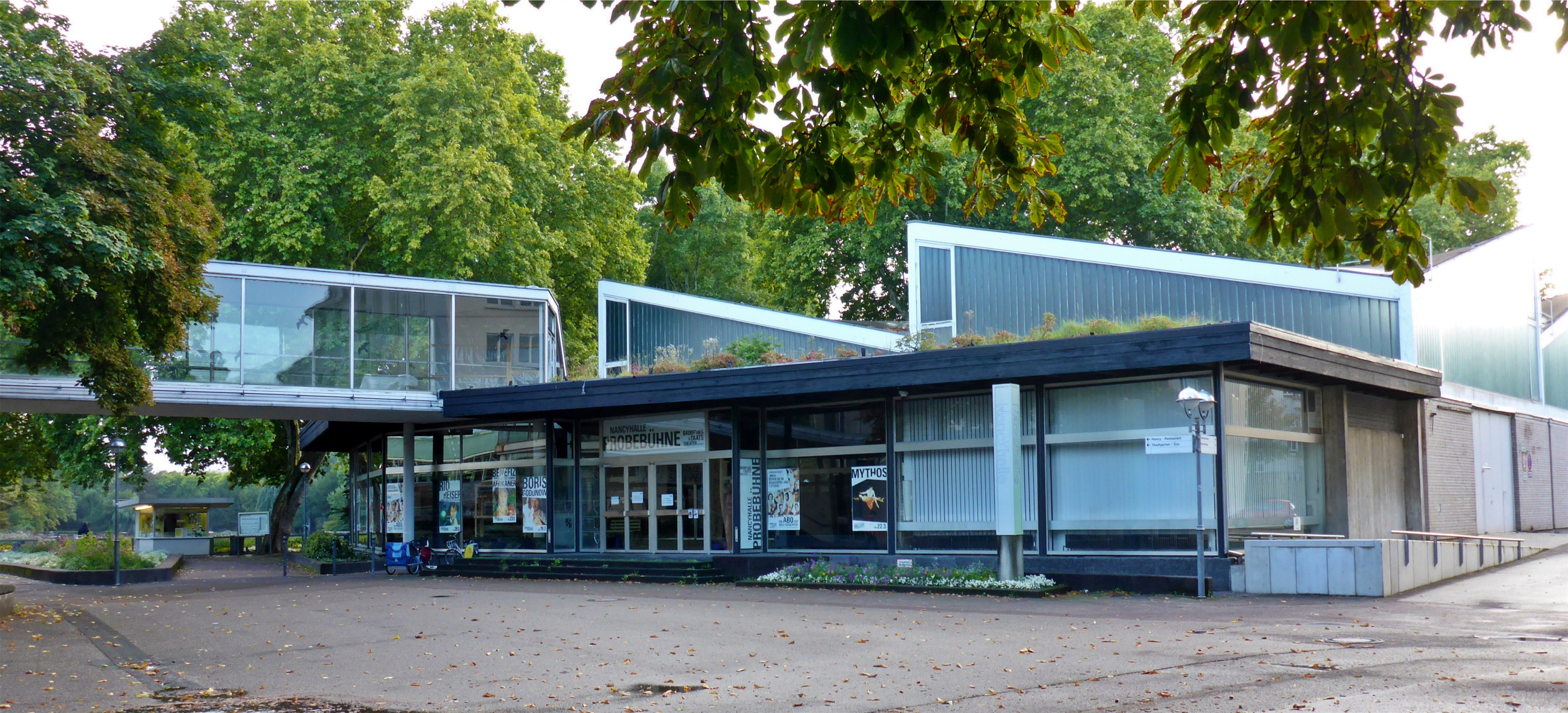 Die Nancyhalle am Stadtgarteneingang Festplatz Karlsruhe